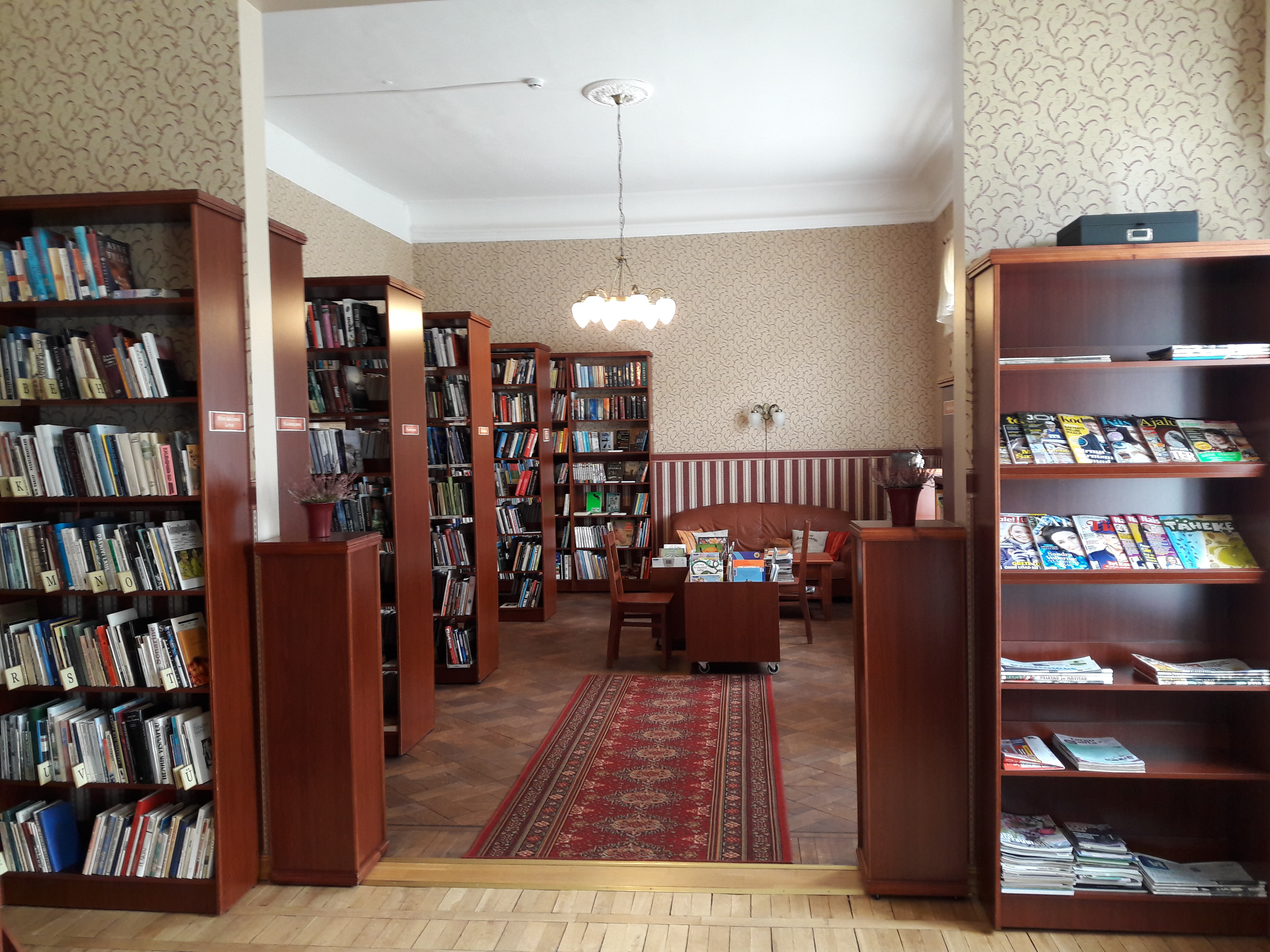 Raamatukogu avariiulid ja lasteala